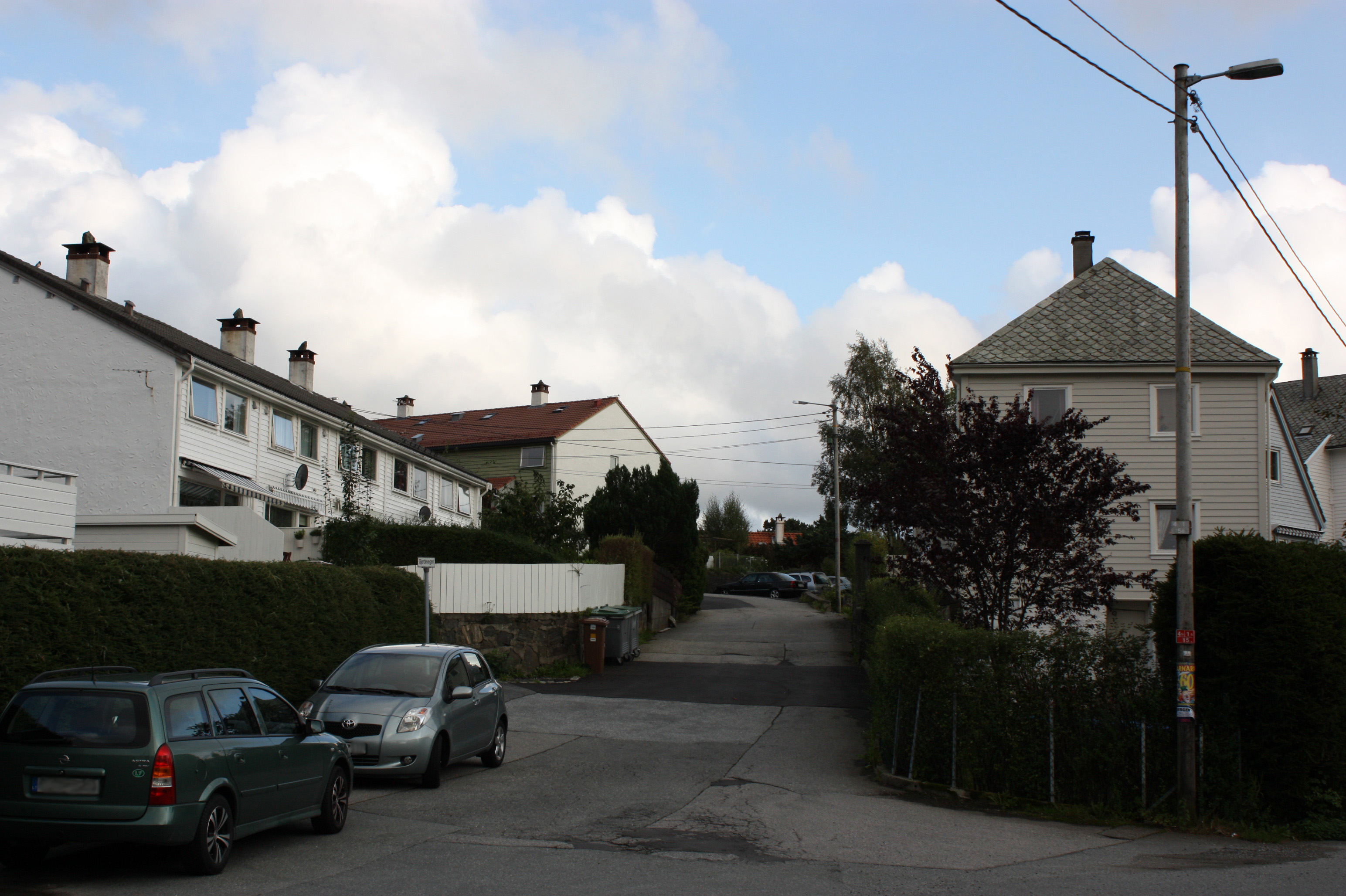 Gjerdevegen, Fana, Bergen.